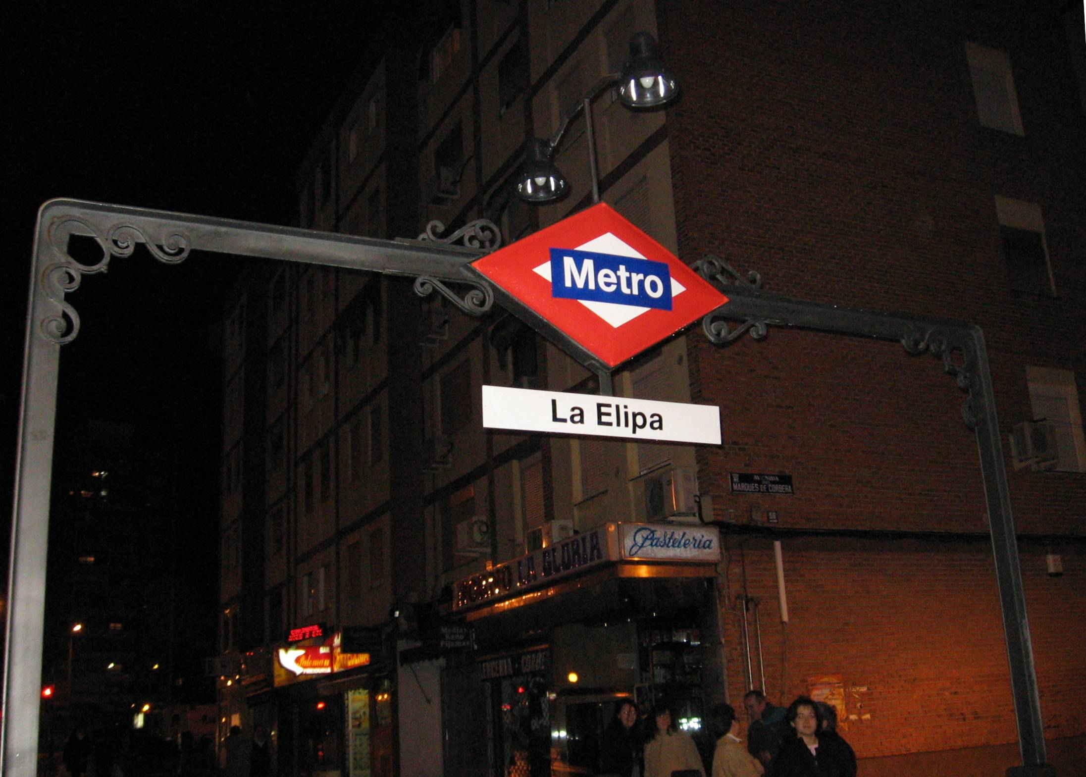 La Elipa metro station